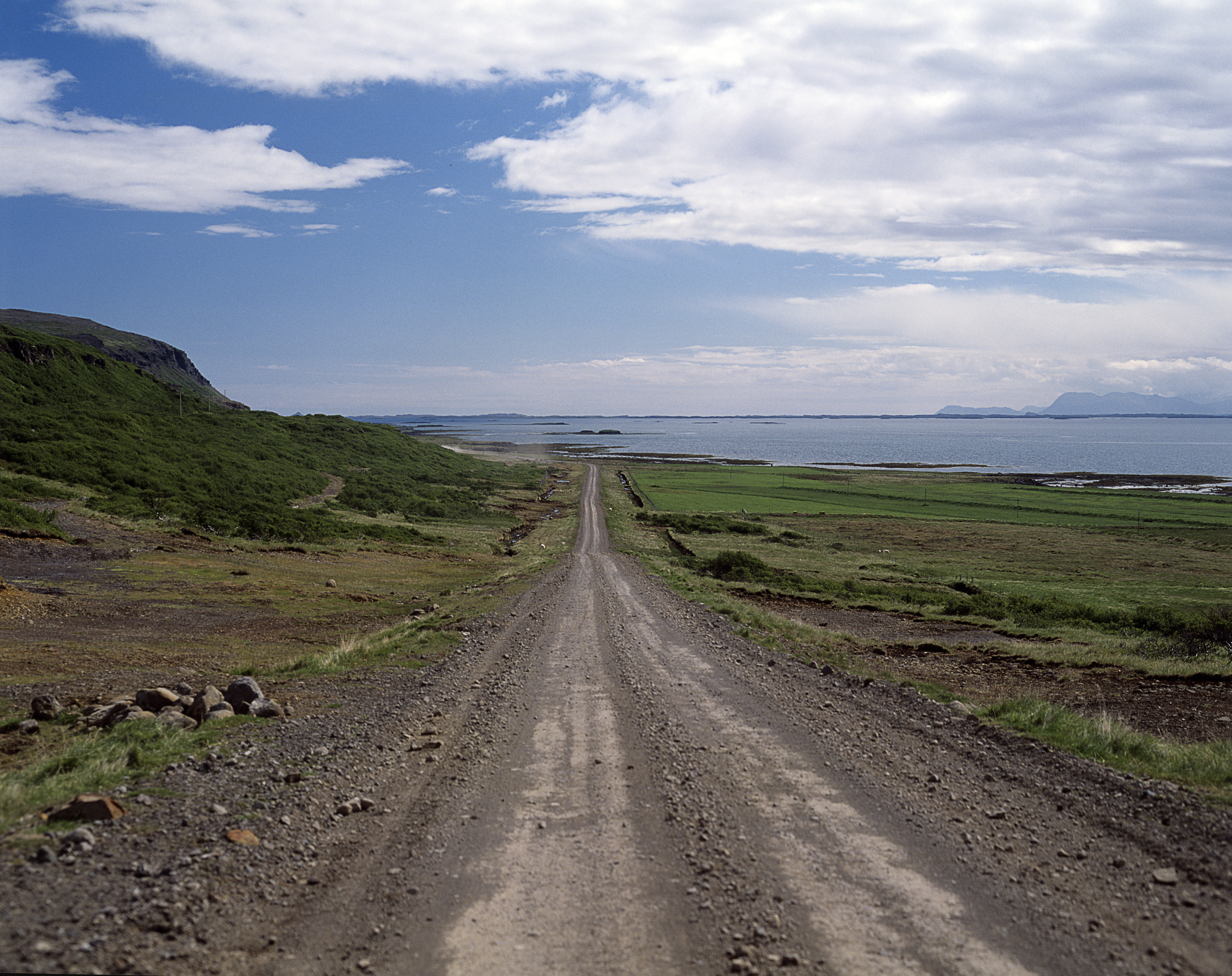 Mündung des Hvammsfjörður zum Breiðafjörður.